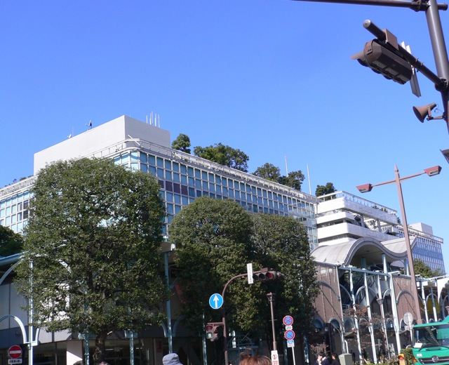 高島屋玉川店